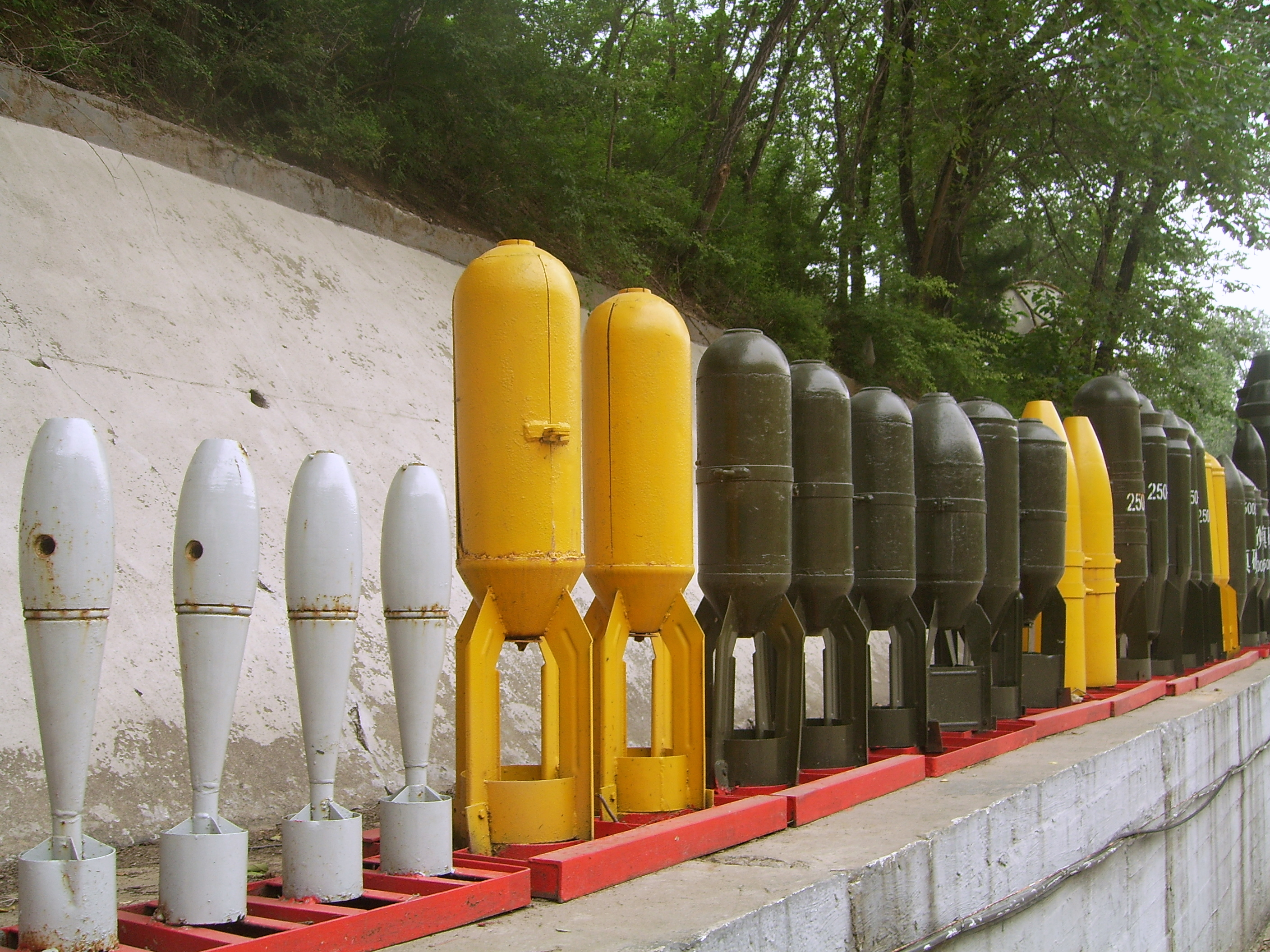 中国的各种航空炸弹，于北京航空博物馆